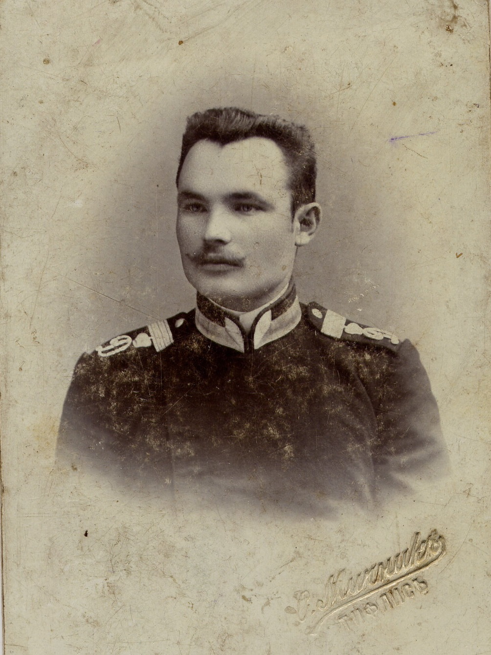 Российская империя Российская Императорская армия Нестроевой старшего разряда 16-го гренадерского Мингрельского Его Императорского Высочества Великого Князя Дмитрия Константиновича полка (предположительно, писарь старшего оклада) Шецест К.Т. (Тифлис, 1904 г.). Пример нарушения формы одежды. Три узкие нашивки на погонах нашиты вплотную друг другу без просветов, чтобы издали выглядели как одна широкая (фельдфебельская) нашивка.